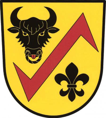 znak, Přestavlky, okres Chrudim